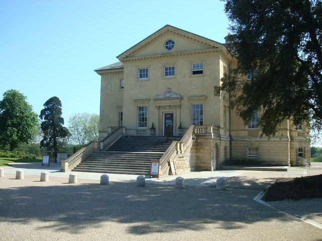 Danson Mansion, Bexley